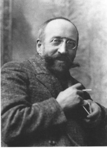 Stanisław Filibert Fleury - autoportret